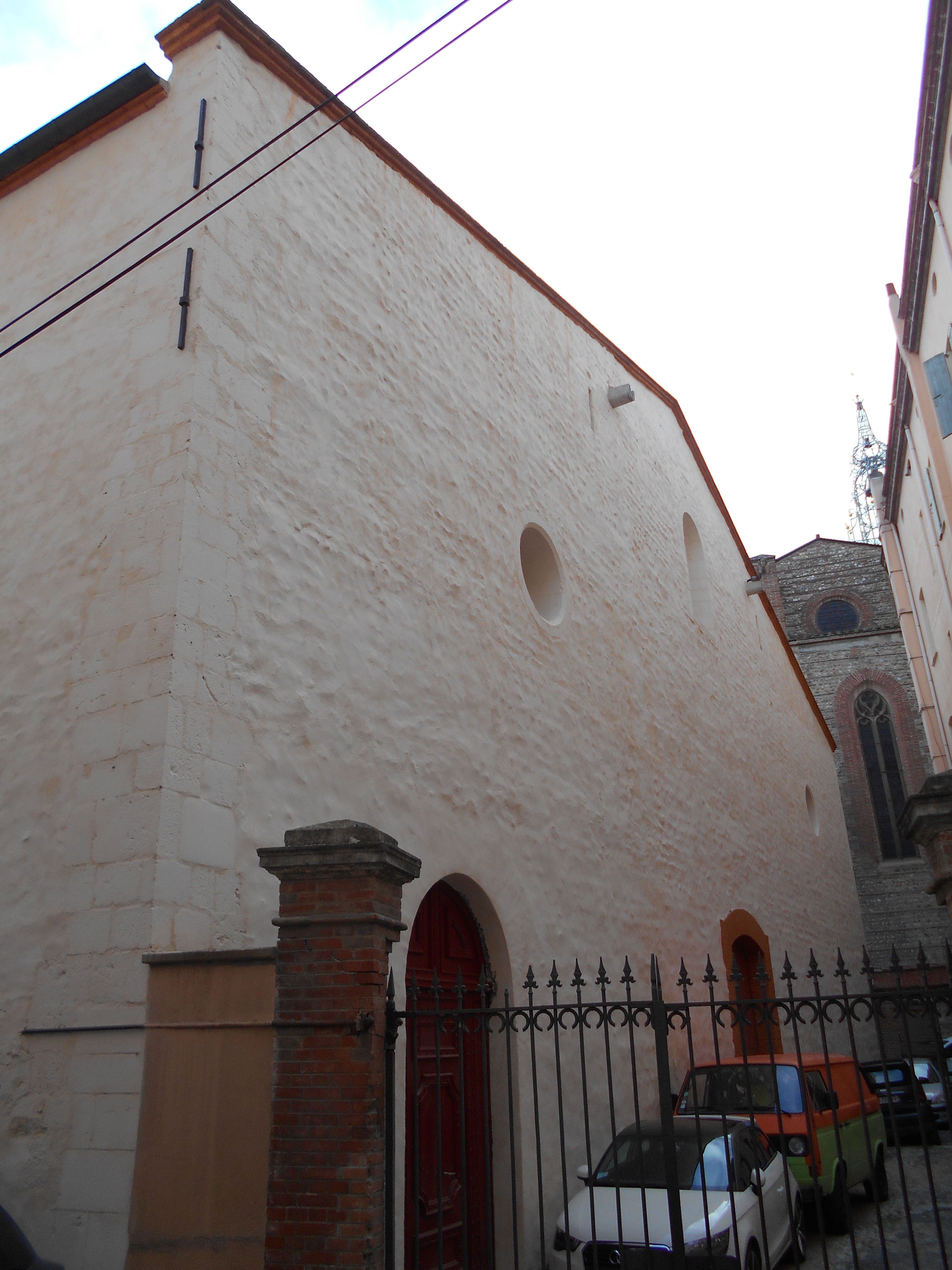 Façana occidental de la capella